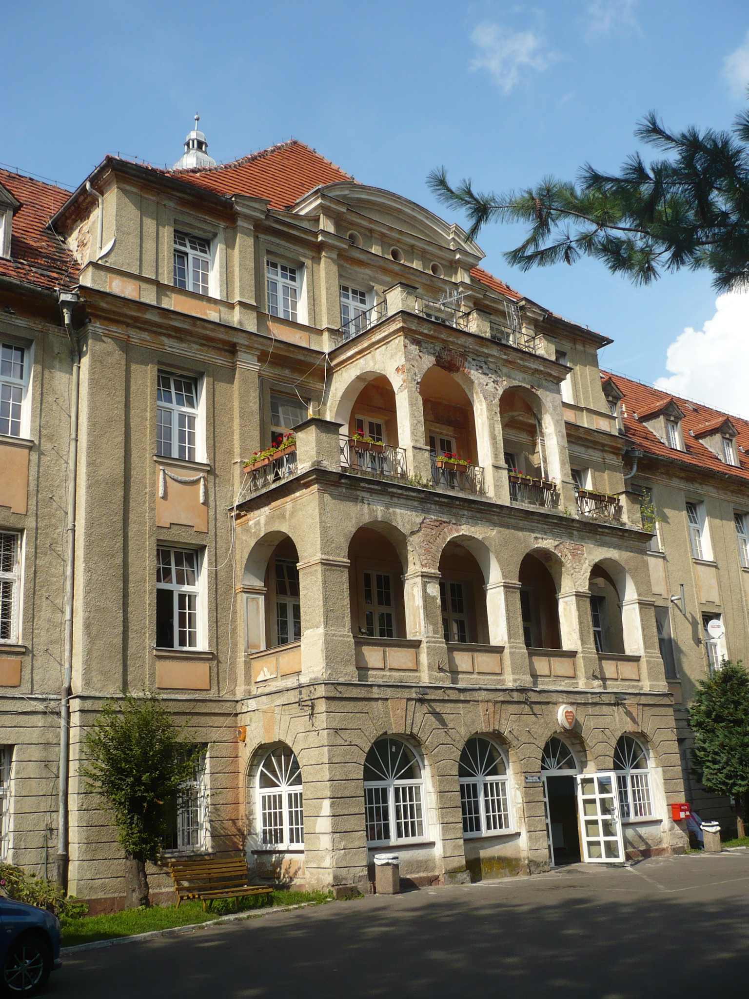 Nowa Ruda, ul. Szpitalna 2 - Szpital bracki (górniczy), 1911